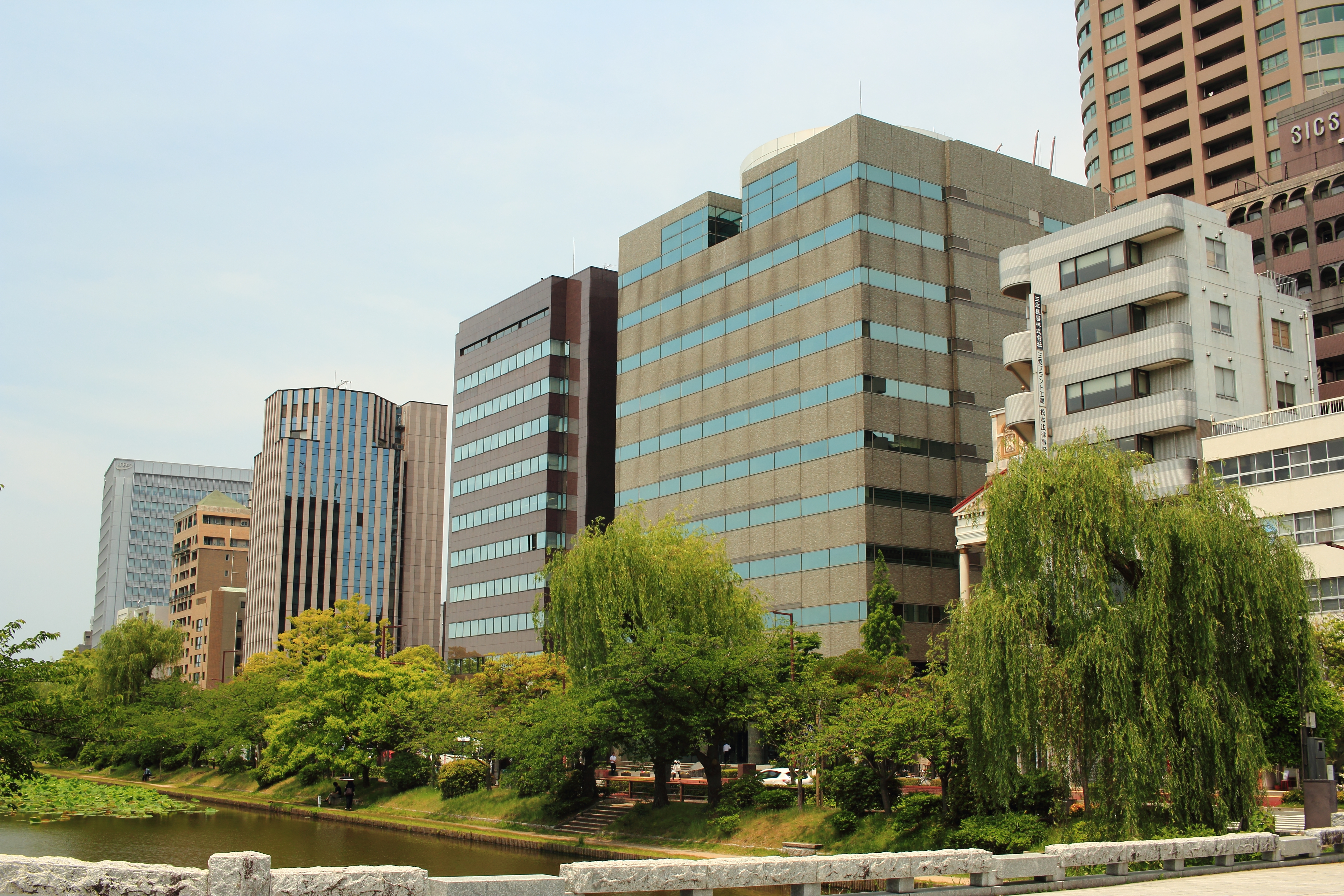 福岡市中央区大手門のオフィルビル街 Canon EOS 60D